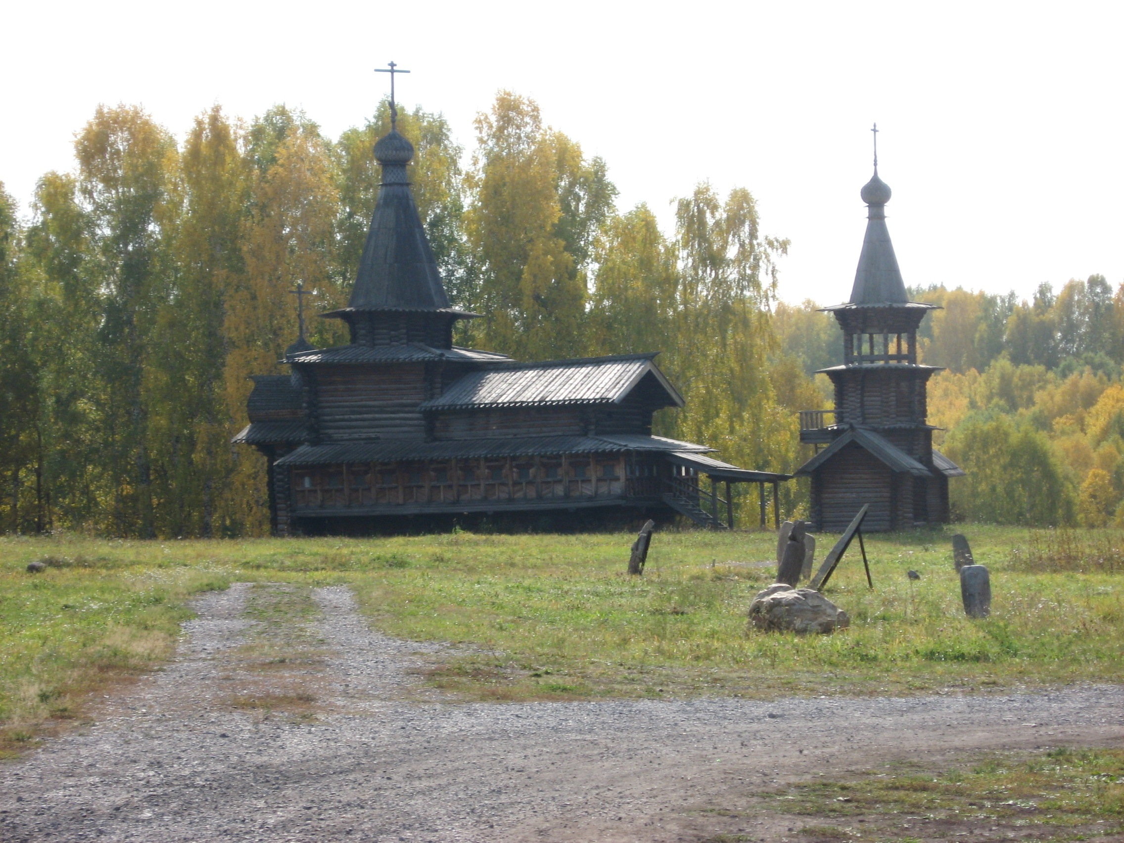 Фотография Спасской церкви XVII в. из Зашиверска со звонницей из Историко-архитектурного музея под открытым небом.